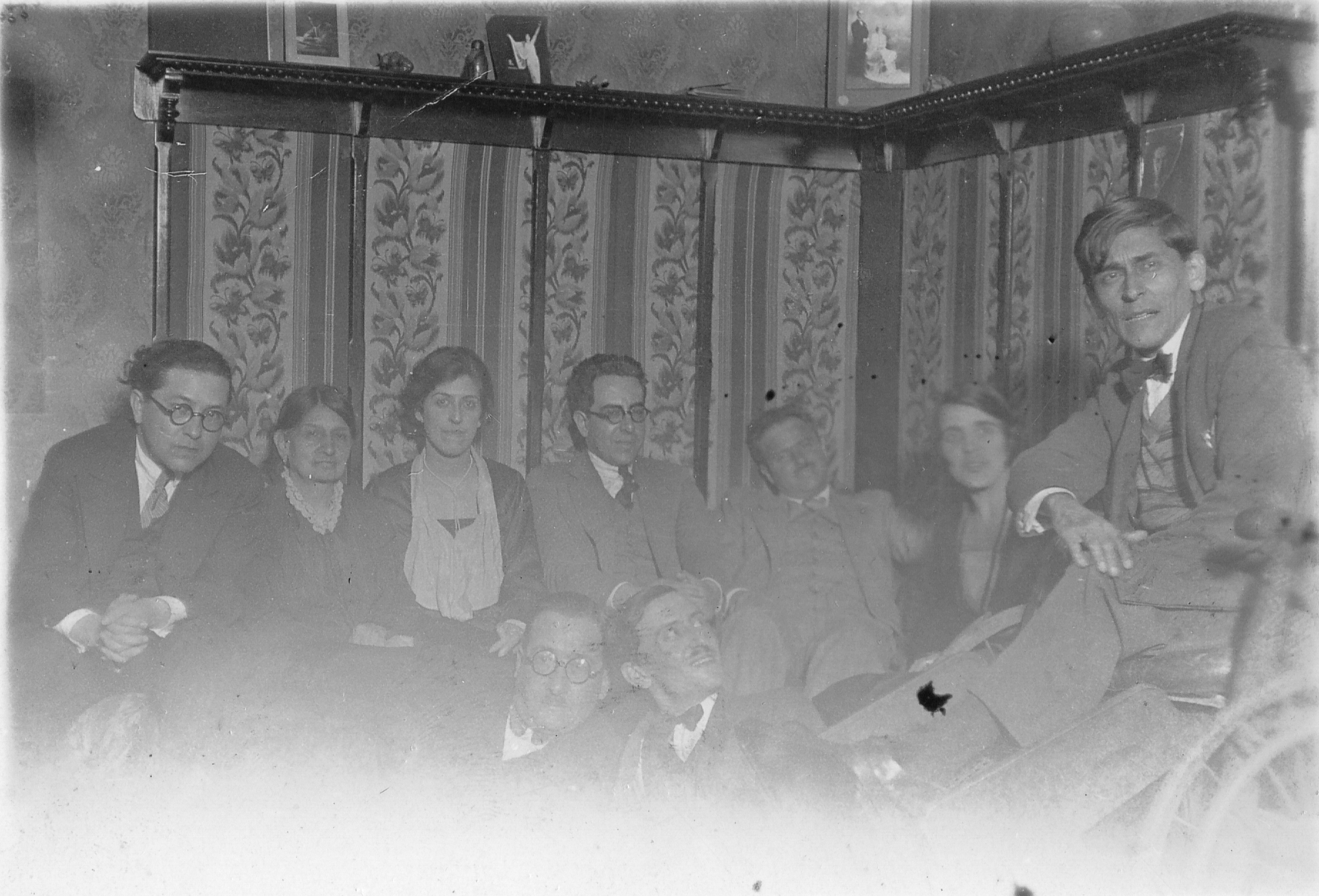 Diciembe de 1929. En la casa de Washington -Izquierda, durante la fiesta que Mariátegui ofreció a Waldo Frank. Aparecen de izquierda a derecha, ALcides Spelucín, Amalia La Chira, señora Vitali, Luis Alberto Sánchez, Waldo Frank, Anna Chiappe, José Carlos Mariátegui, abajo: Santiago Vitali y Hugo Pesce. Puede usarse libremente bajo licencia CC mencionando en los créditos "Archivo José Carlos Maríategui, Lima, Peru (